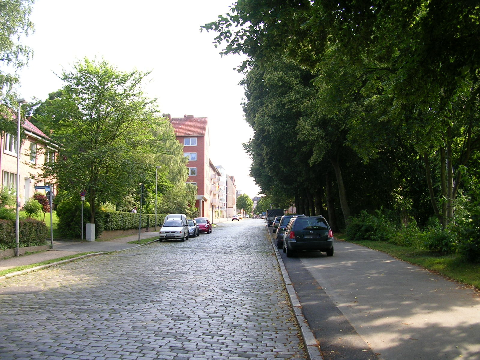 Selbst erstelltes Foto - svenne